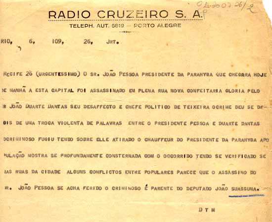 Telegrama a Osvaldo Aranha comunicando o assassinato de João Pessoa, em 26 de julho de 1930. (CPDOC/Ao 30.07.06/2)